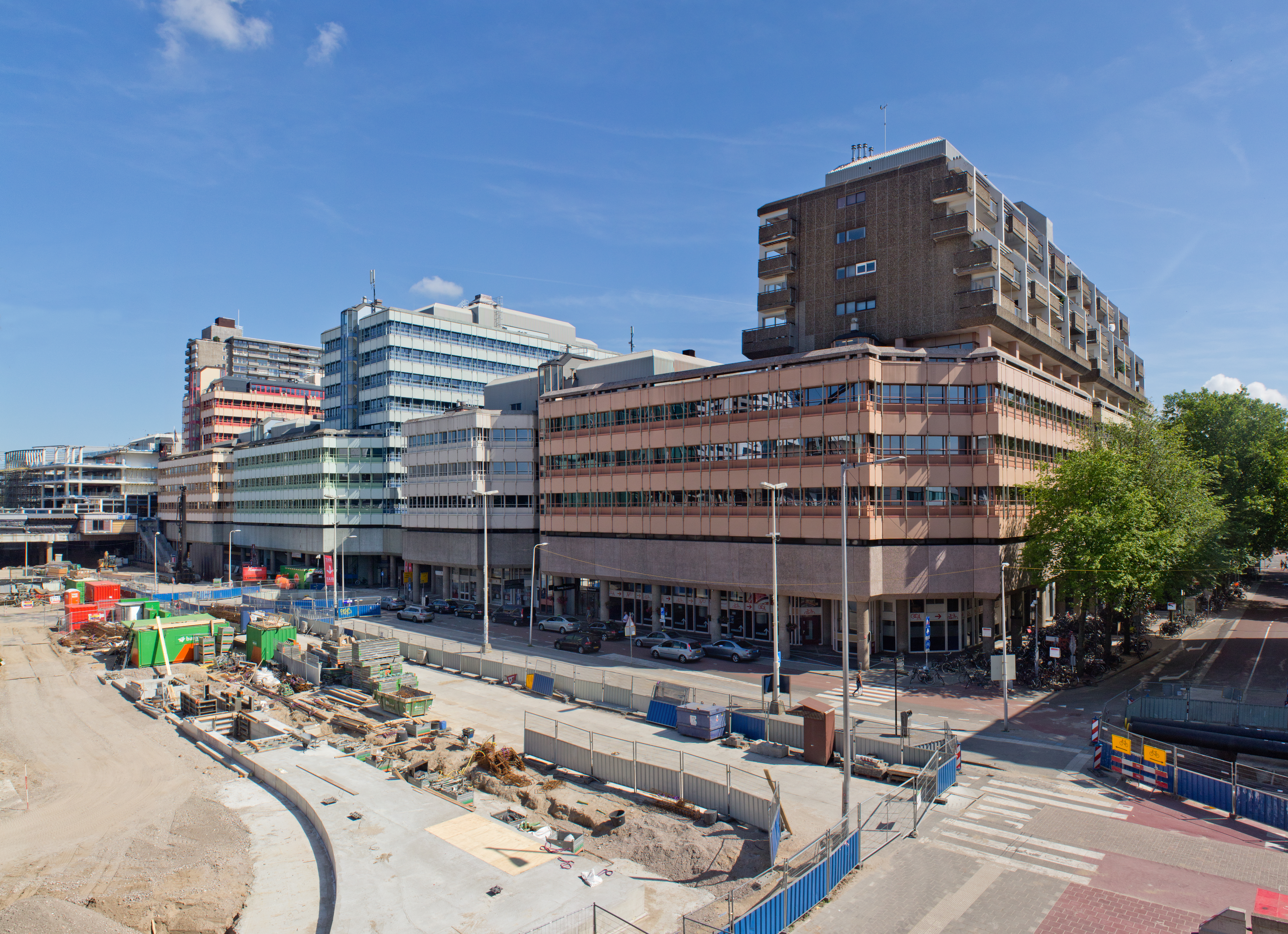 Overzicht van het gebouwencomplex van Hoog Catharijne vanaf de Moreelsebrug